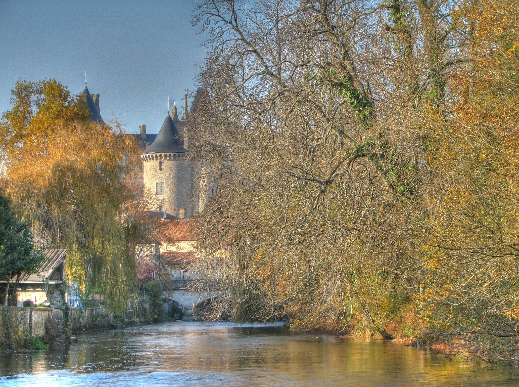 Verteuil 04 HDR